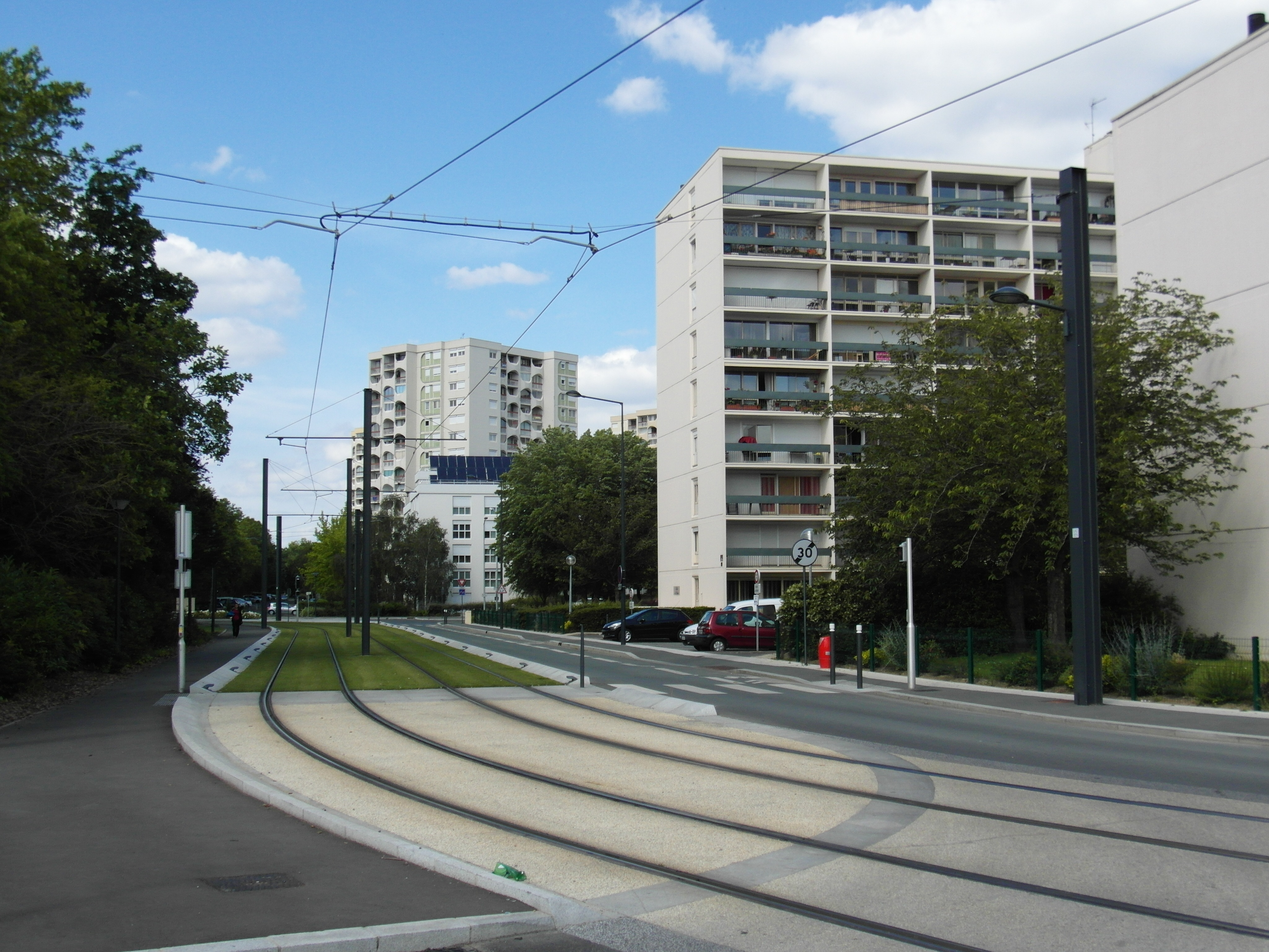 Streckenast in den Süden der Stadt - Großsiedlungsstrukturen